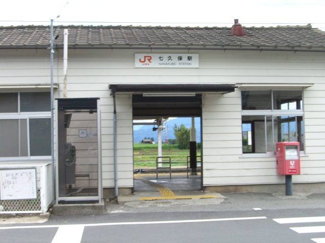 七久保駅